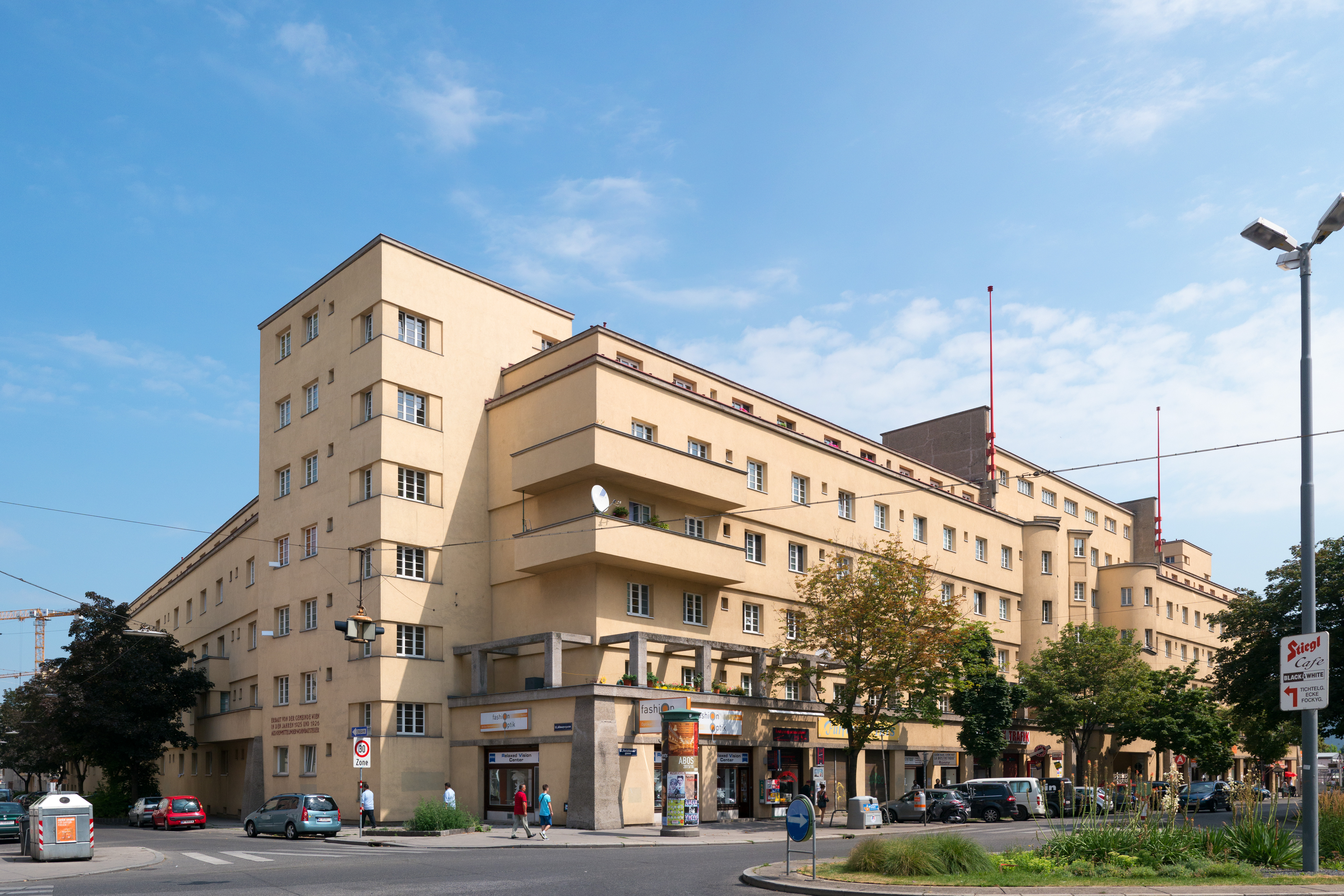 Bebelhof